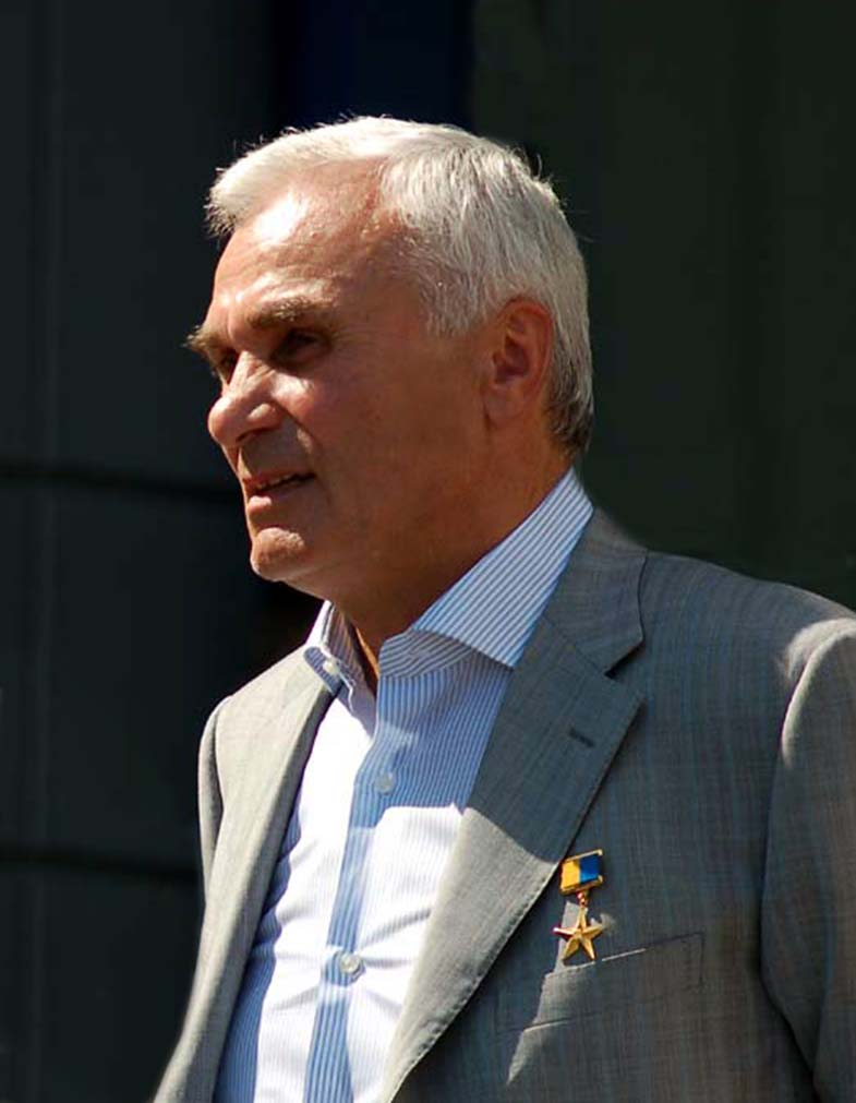 Председатель правления ОАО «Киевметрострой» Герой Украины Владимир Петренко